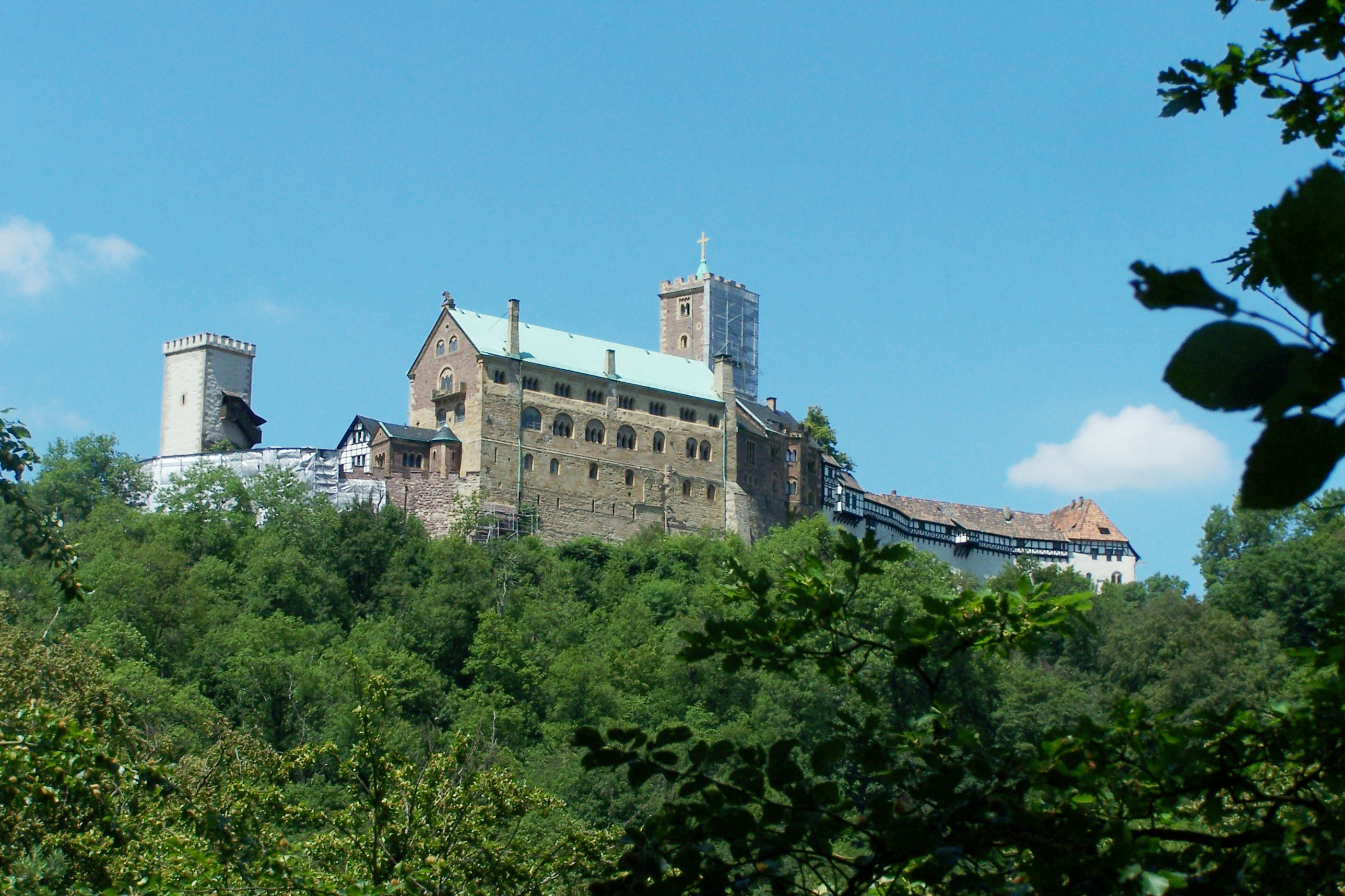 Die Wartburg von Südosten.